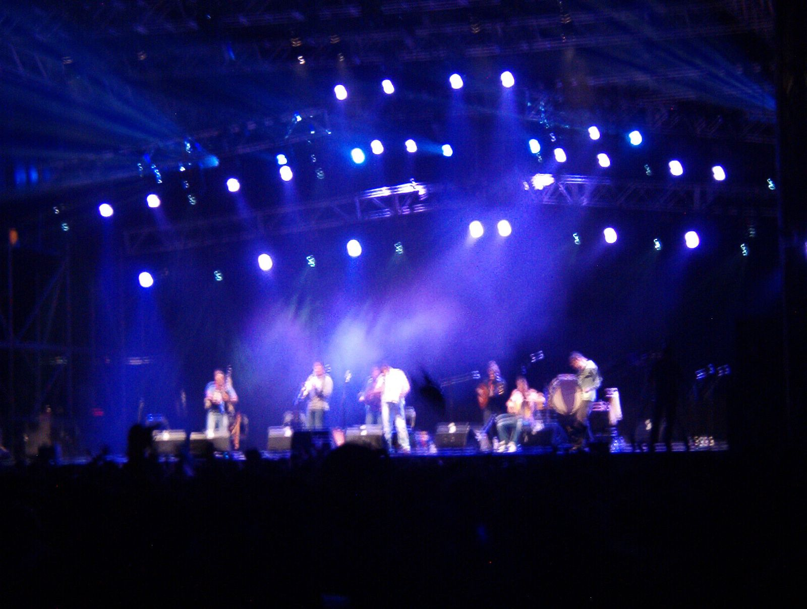 Concerto durante o Festival da música celta de Ortigueira, Galicia